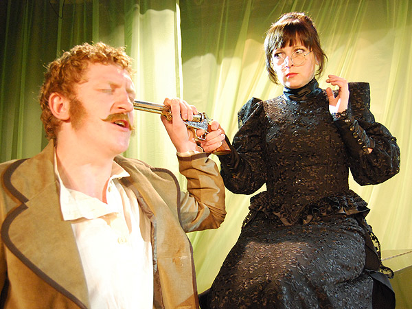 Николай Авдеев и Елена Дворянскова